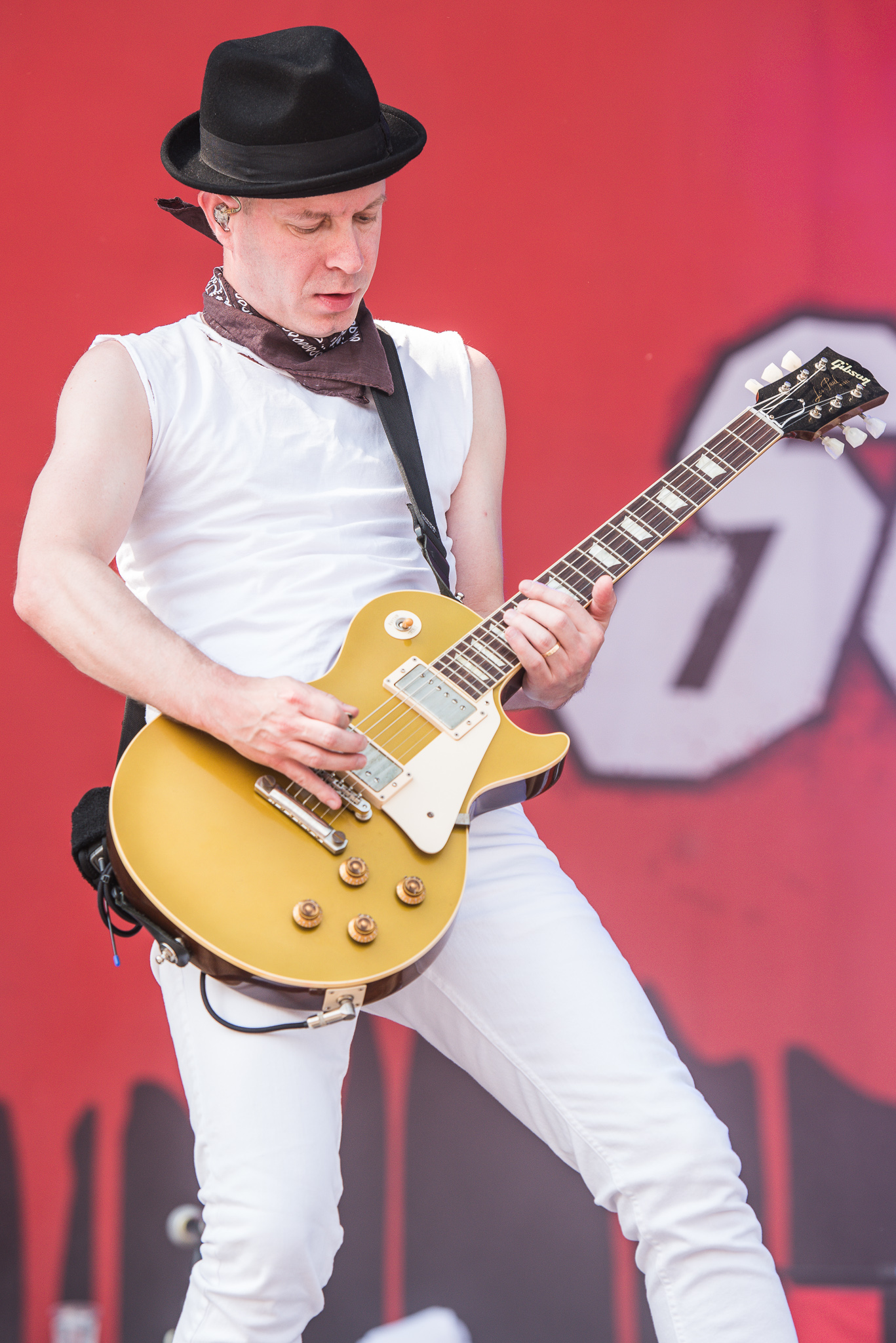 ARGO-Konzerte,Konzert,Livekonzert,Livemusik,Musik,RiP,Rock im Park 2017,Sum 41,Tom Thacker,Zeppelin Stage